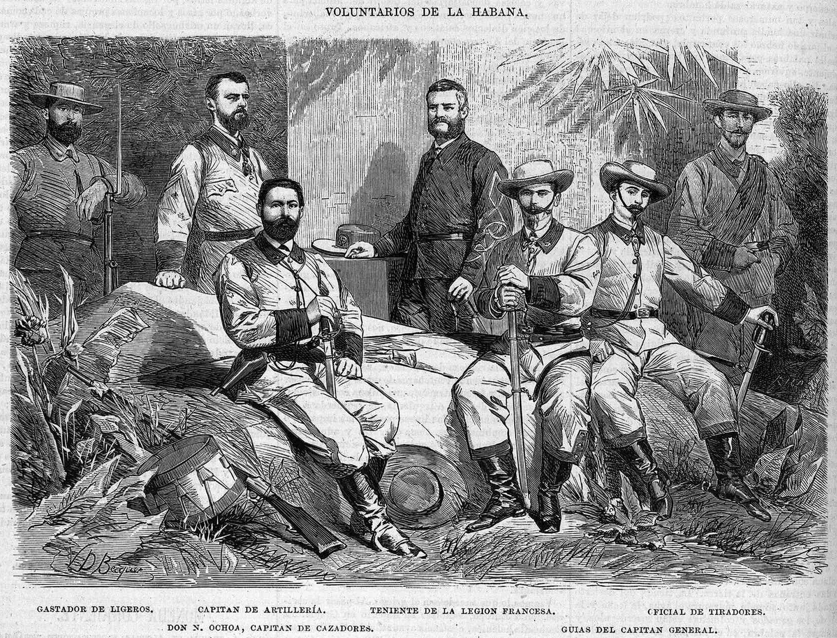 Voluntarios de La Habana, en la revista La Ilustración de Madrid.